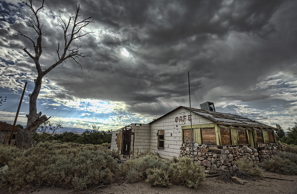 Alabama Hills, California